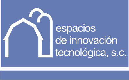 Logotipo Espacios de Innovación tecnológica